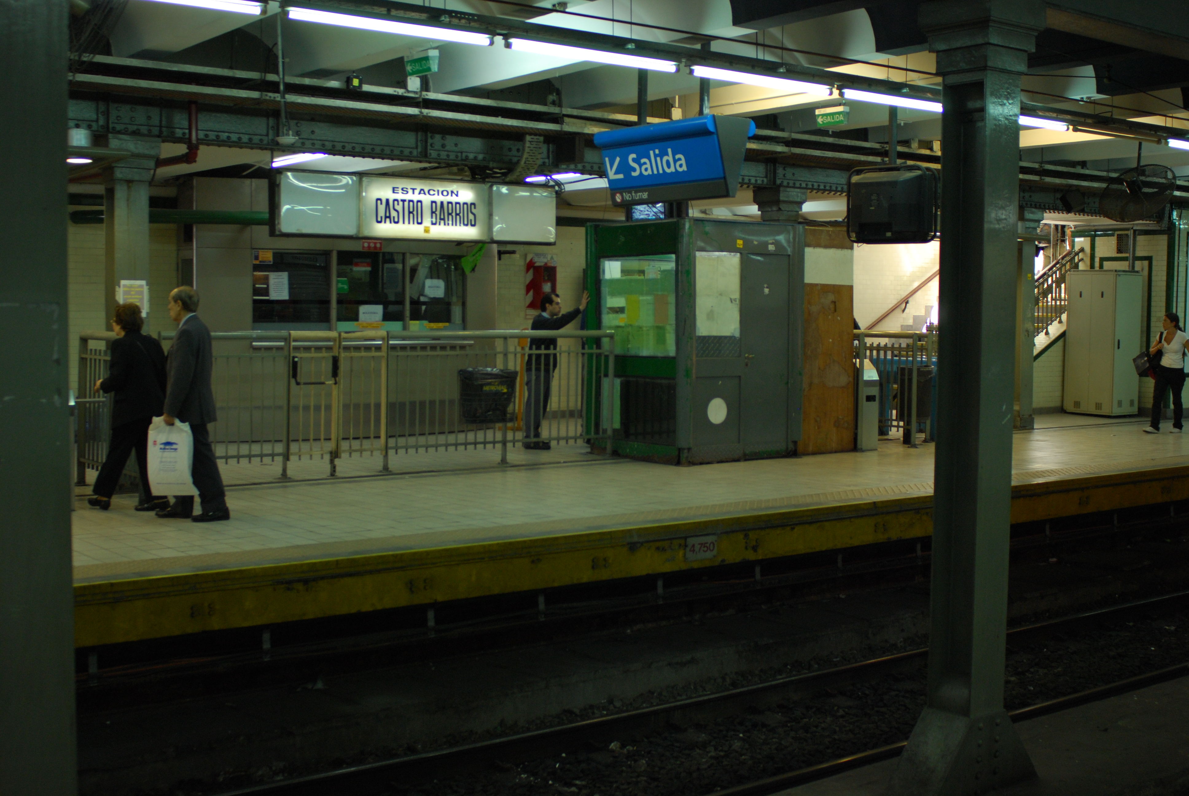 Boletería y andén de trenes hacia Primera Junta en la estación Castro Barros de la línea A de subtes en Buenos Aires, Argentina (diciembre 2008)